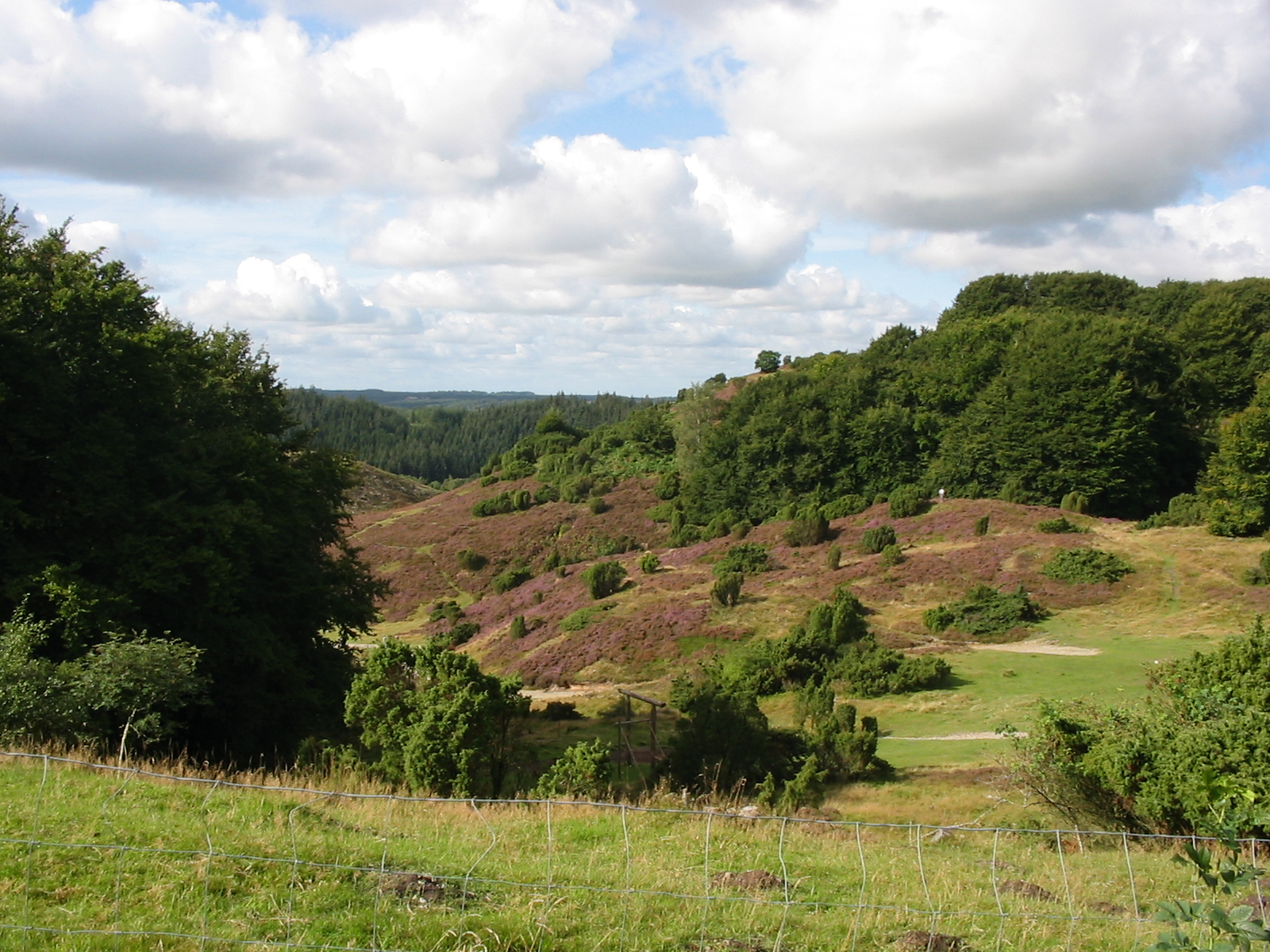 Rebild Bakker (Danmark)